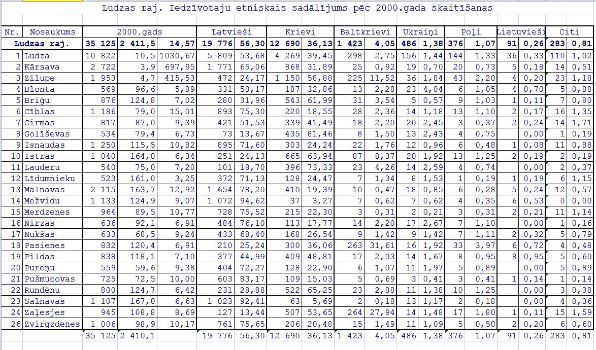 результаты переписи населения Латвии ни 01.04.2000